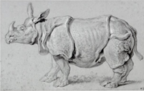 Clara, Nashorn. Zeichnung, schwarze Kreide, weiß´gehöht; 27,5 x 44,4 cm